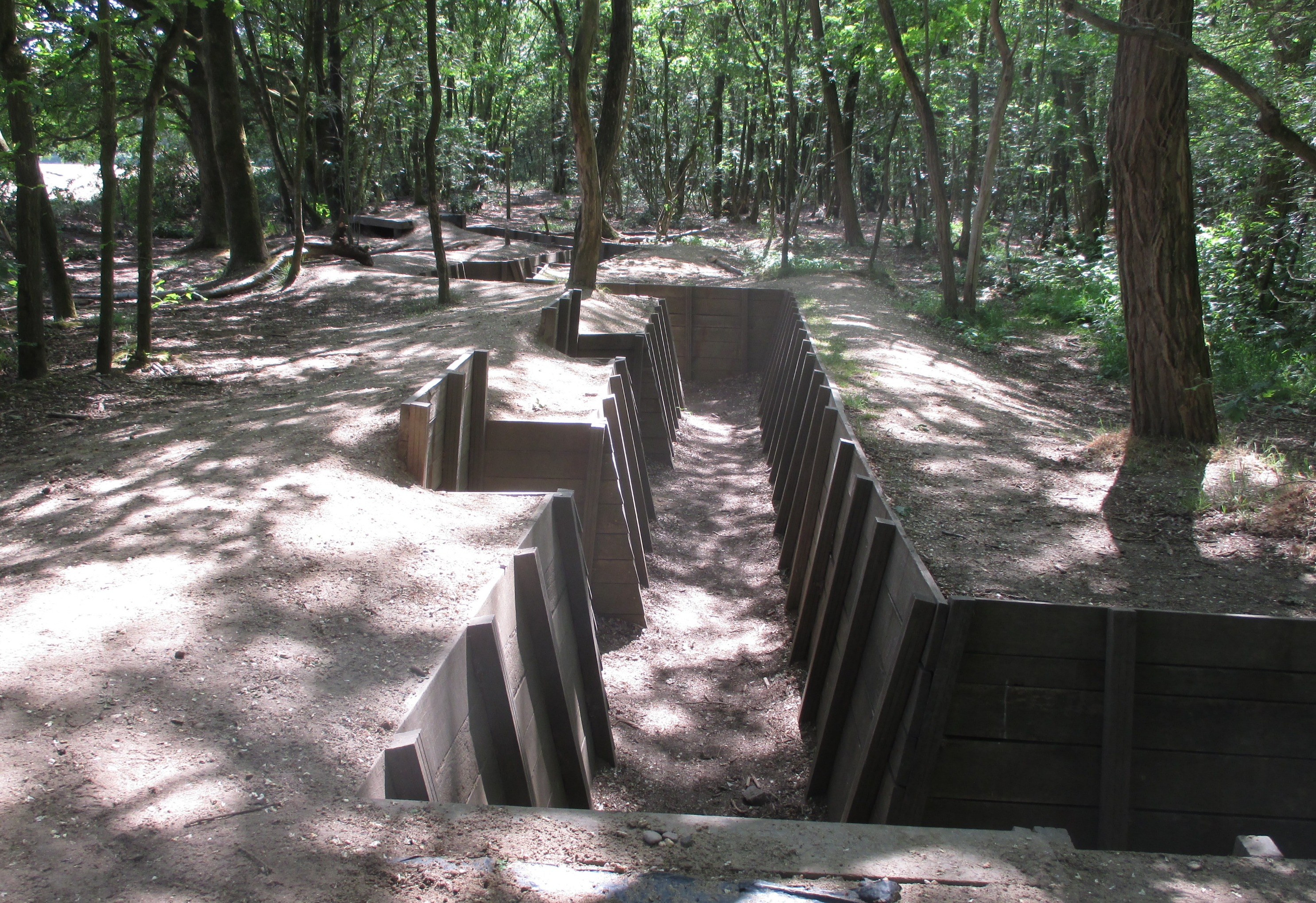 Loopgraaf Grebbeberg reconstructie